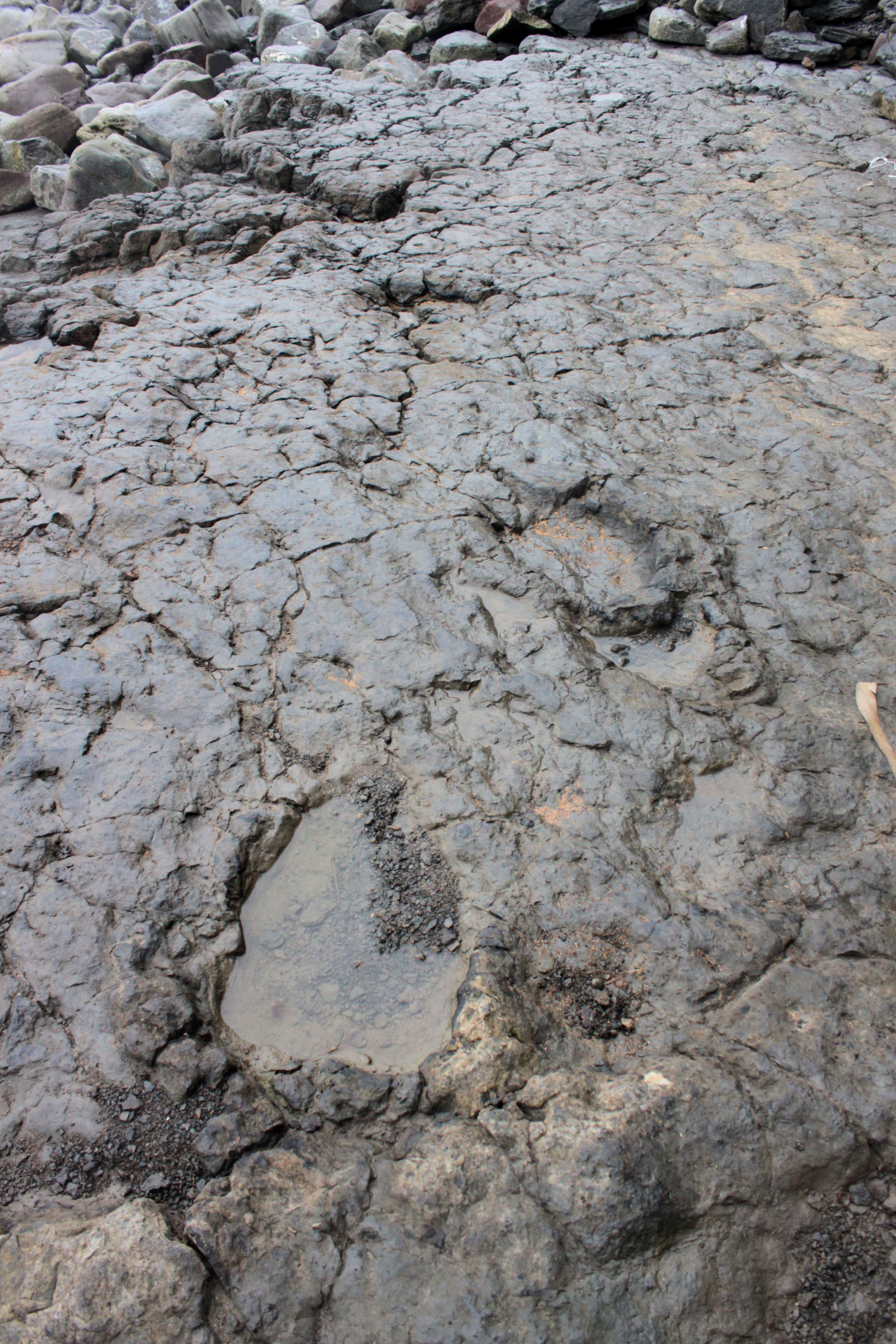 Brontopodus. Icnitas de un saurópodo de medianas dimensiones, aproximadamente 1,80 metros de altura hasta la cadera. Se observa la impresión varias patas delanteras y traseras (Jurásico Superior). Playa de La Griega, Colunga, Asturias, España.